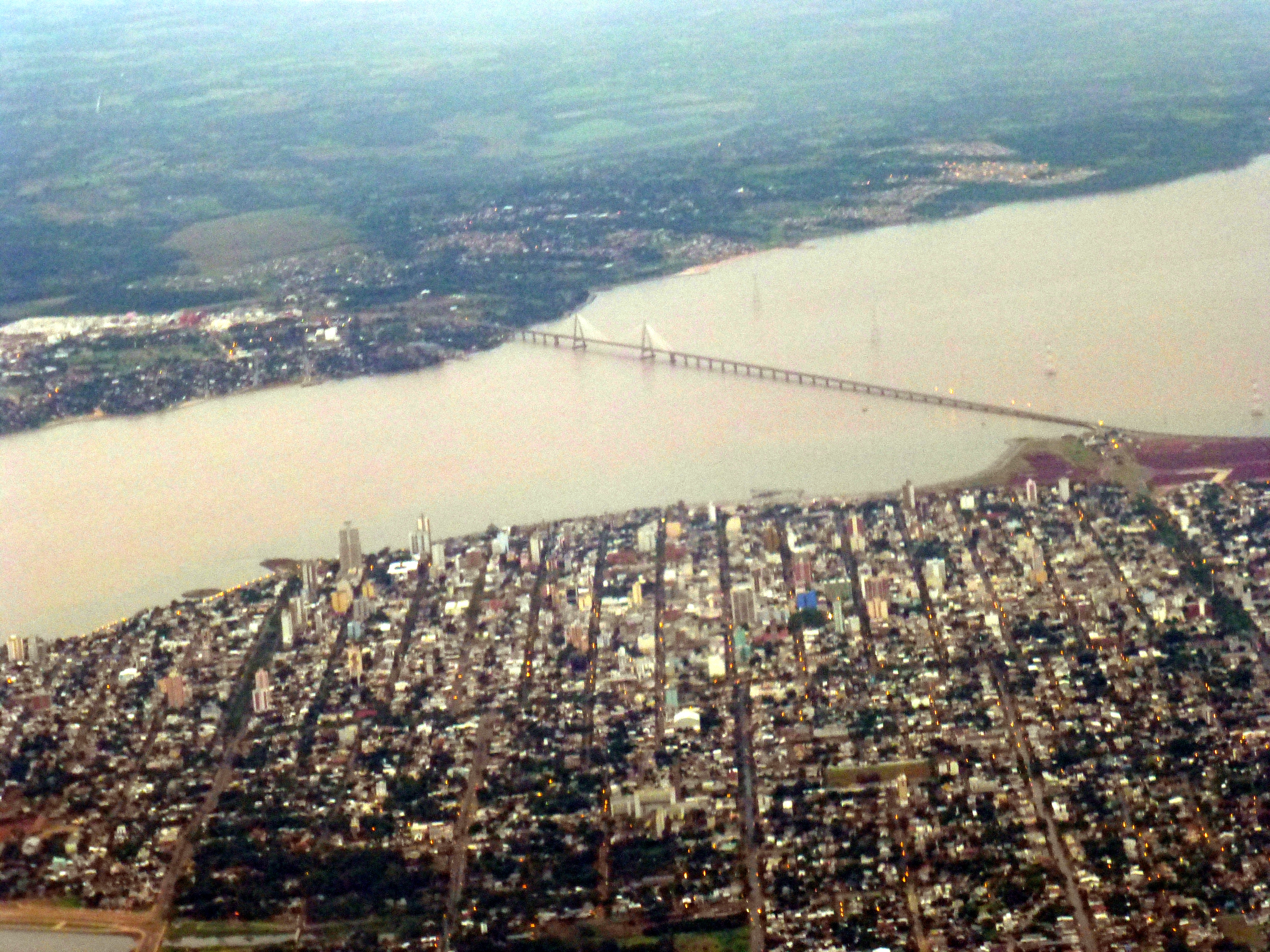 Vista aérea de la ciudad de Posadas, provincia de Misiones.